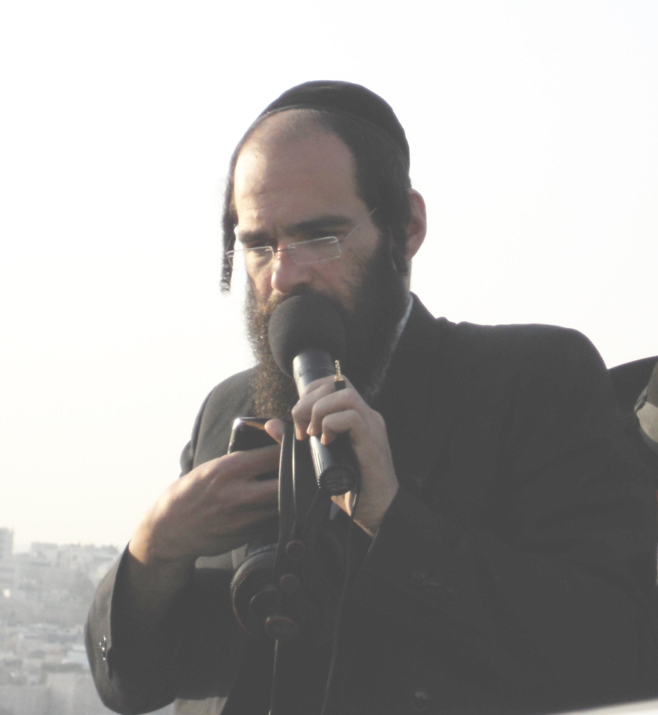 אברהם פרסטר בהר הזיתים בשידור בלוויית הרב שיינברג